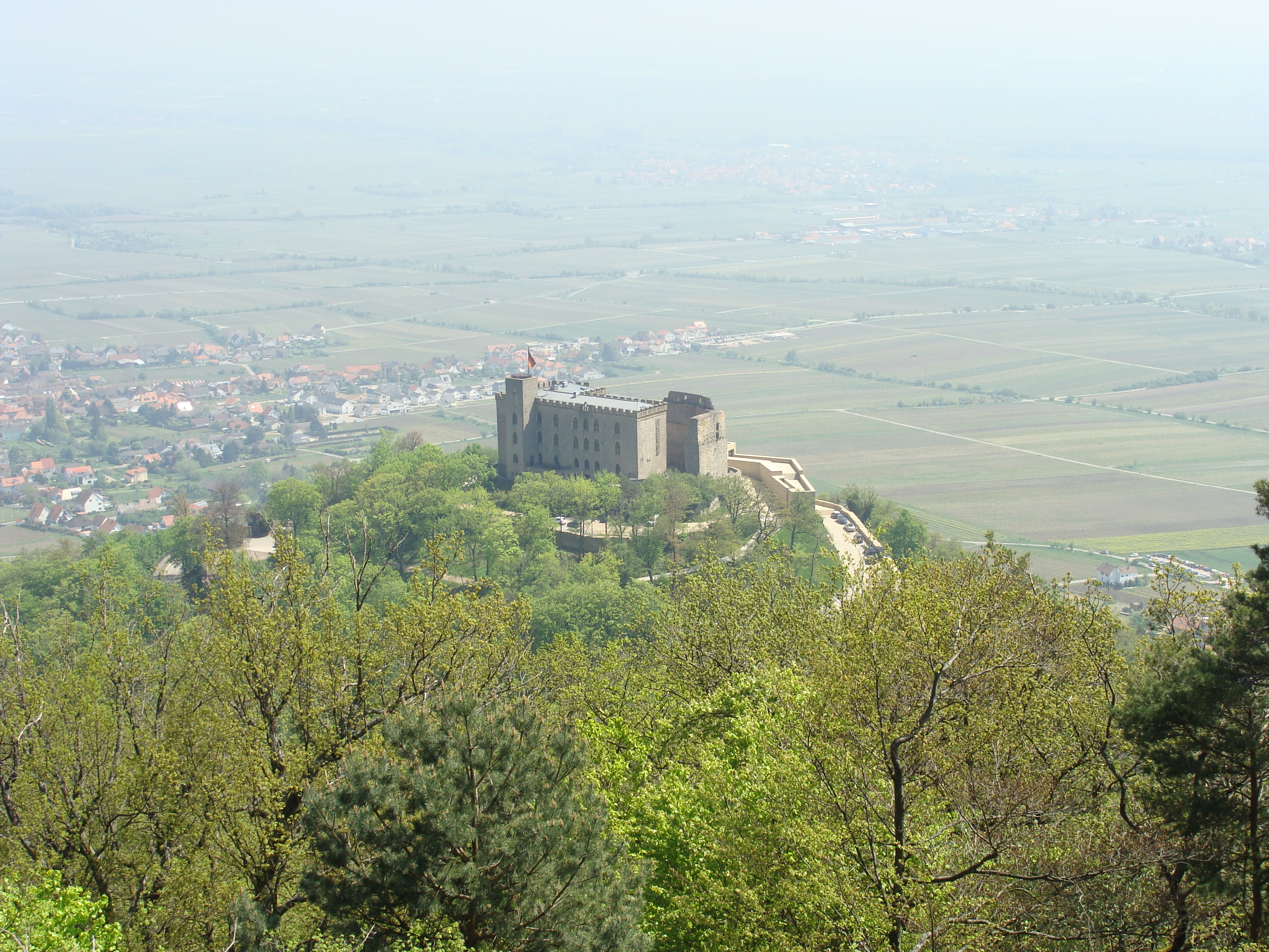 Hambacher Schloss - Blick vom Sühnekreuz am Rittersberg